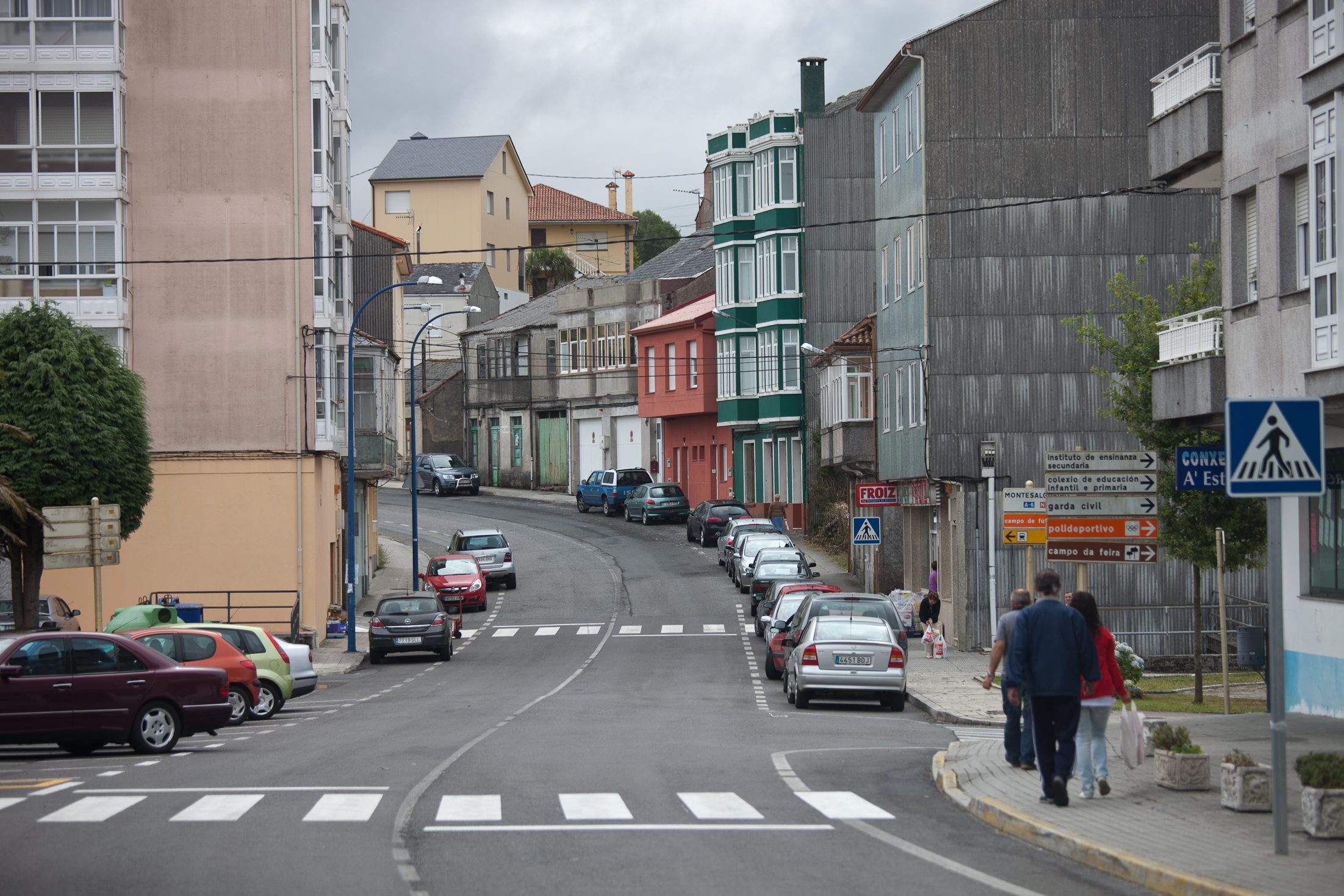 Rúa, Curtis, Galiza.